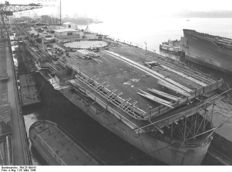 Neubau Bau-Nr. K 252. Bauzustand Aufgen. am 26.3.40 Deutsche Werke Kiel